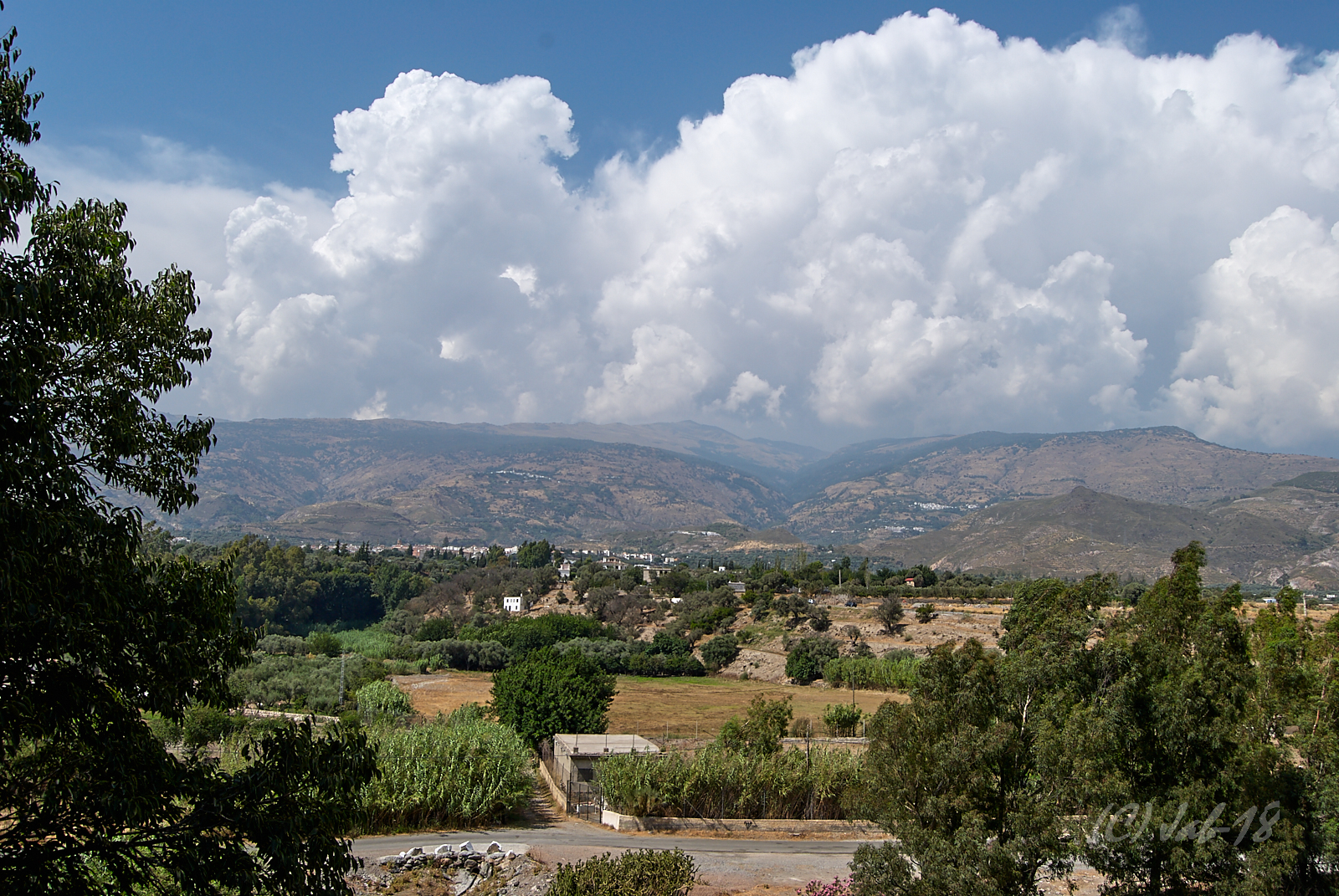 Vista panorámica desde la carretera de Orgiva hacia la Alpujarra.